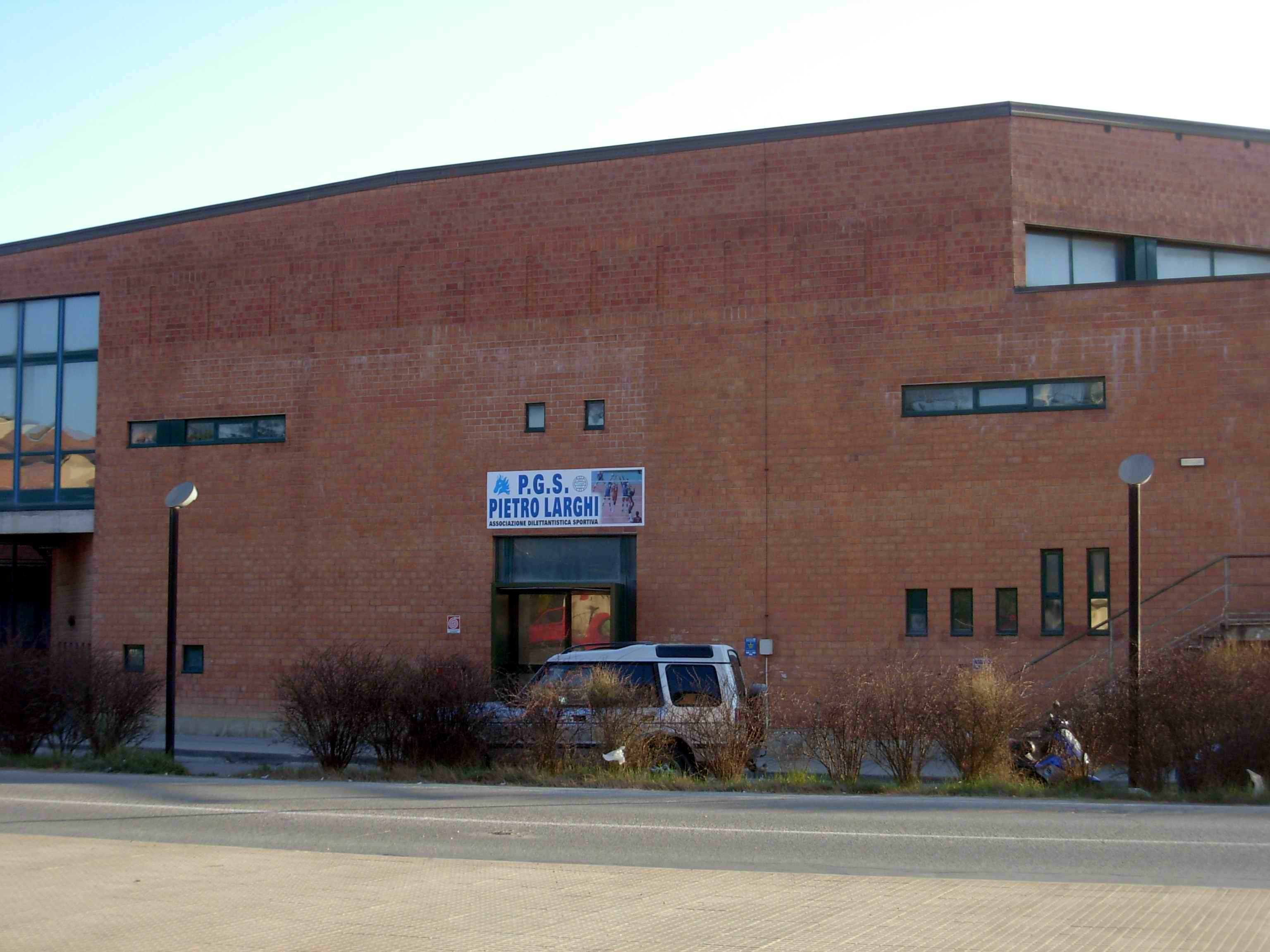 Colle di Val d'Elsa (Siena-Italia): Palazzetto dello Sport di Viale dei Mille